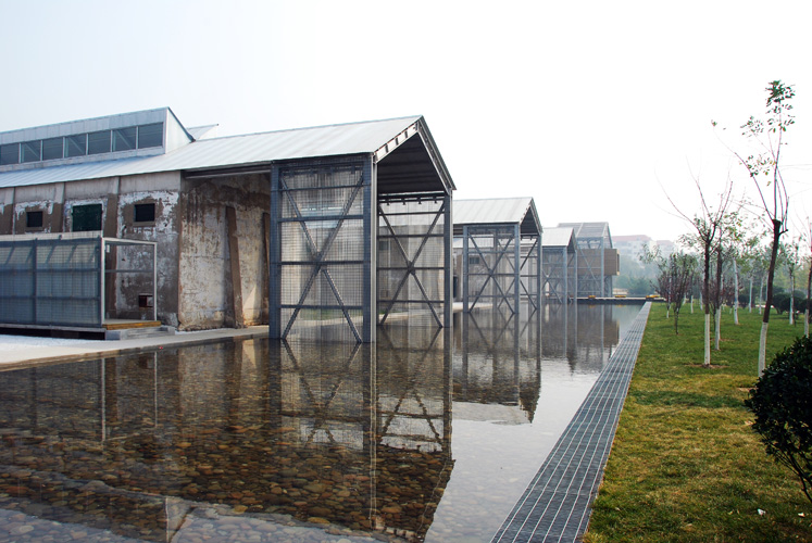 新建唐山城市展览馆1